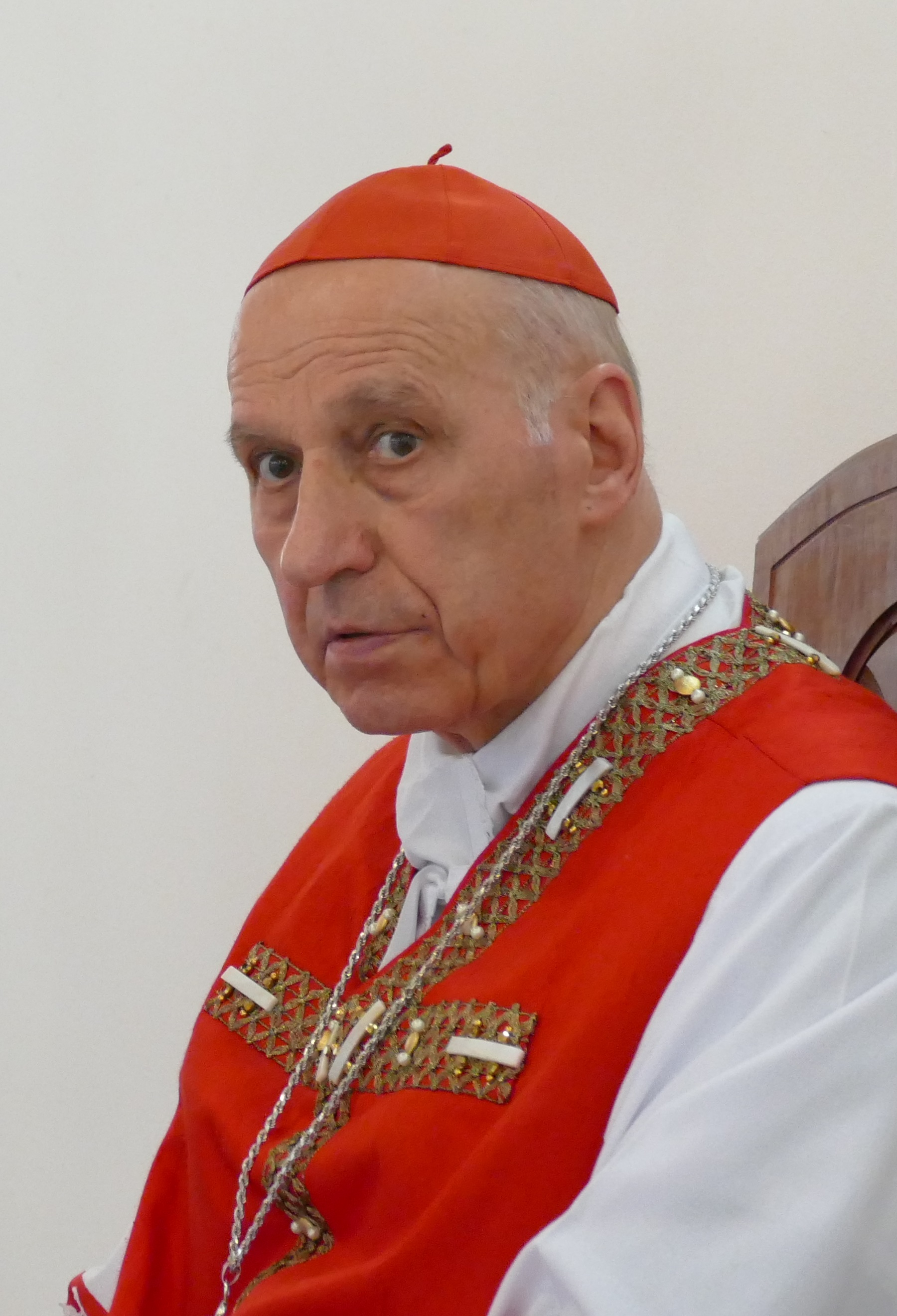 Il Card. Severino Poletto, durante la celebrazione delle cresime.